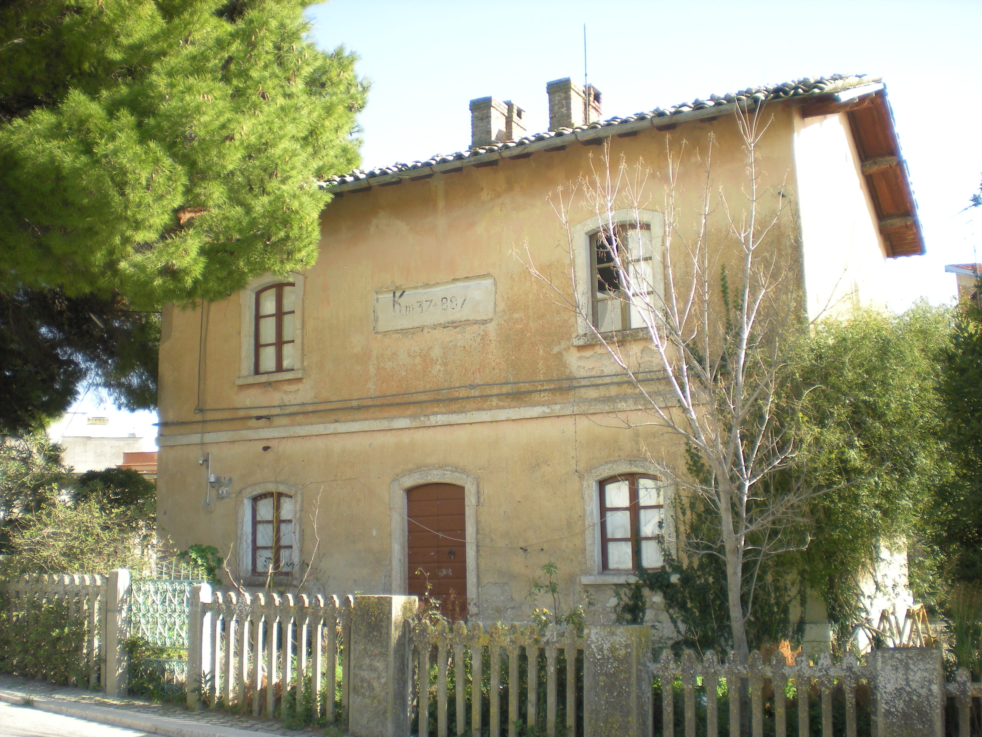 Antico casello ferroviario di Bivona